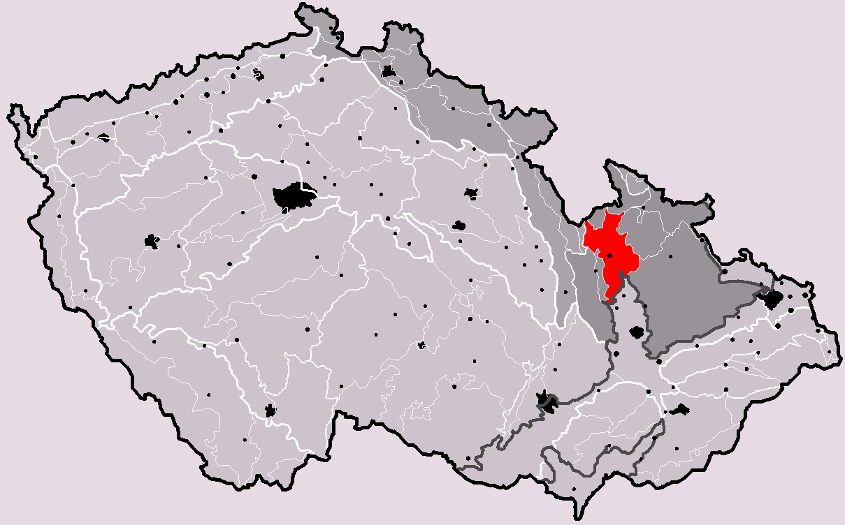 Poloha geomorfologického celku Hanušovická vrchovina v rámci České republiky. Hercynský systém Hercynská pohoří I Česká vysočina I4 (IV) Krkonošsko-jesenická subprovincie I4C (IVC) Jesenická oblast I4C-3 (IVC-3) Hanušovická vrchovina